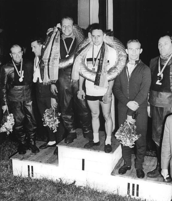 Heinz Wahl, Siegfried Wustrow, Georg Stoltze Zentralbild Buschel 9.8.1961 Siegfried Wustrow Deutscher Stehermeister In Karl-Marx-Stadt wurden am 7.8.1961 die Deutschen Meisterschaften im Dauerfahren ausgetragen. Den Titel holte sich Siegfried Wustrow mit Schrittmacher Zawdazki. UBz: Siegfried Wustrow mit Schrittmacher Zawdazki belegte den 1. Platz (Mitte), Heinz Wahl hinter Schondorf erkämpfte den 2. Platz (links) vor Georg Stoltze mit Schrittmacher Erdenberger (rechts).